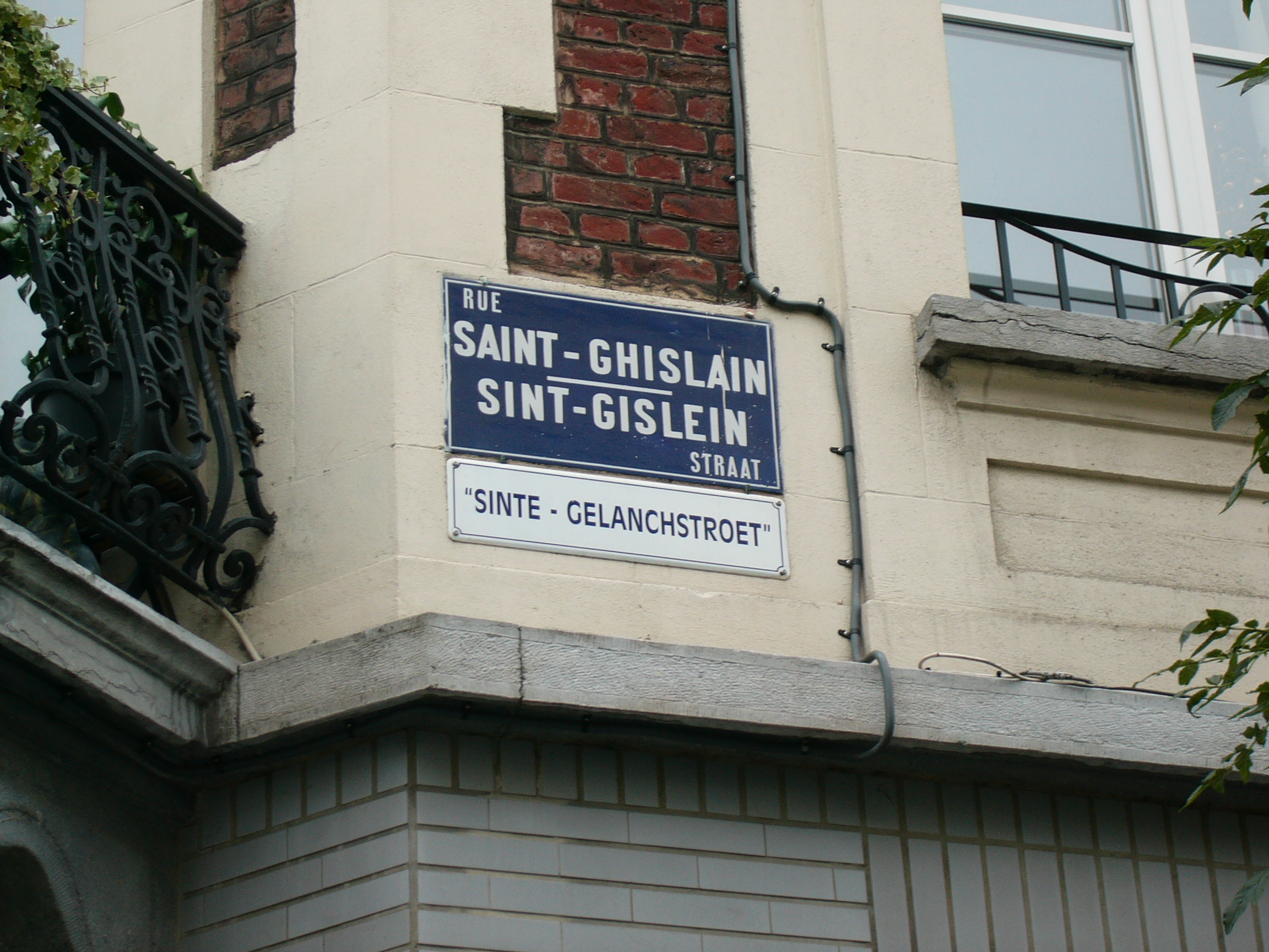 Straatnaambord in de Marollen in Brussel in het Frans, Nederlands en Brussels Foto door Cicero, augustus 2006